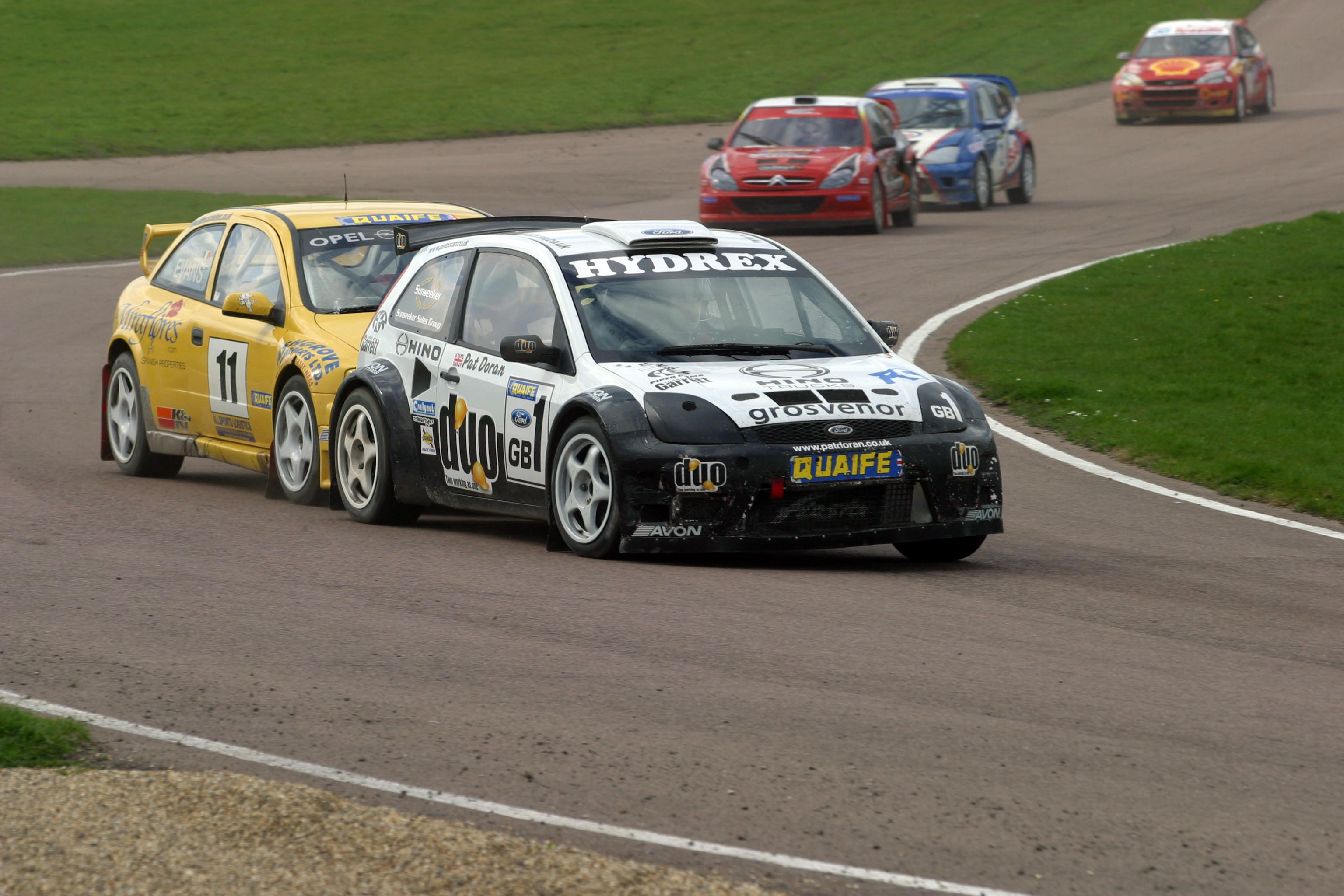 Pat Doran (GB) und sein Ford Fiesta beim Rallycross (Lydden Circuit, 2006)